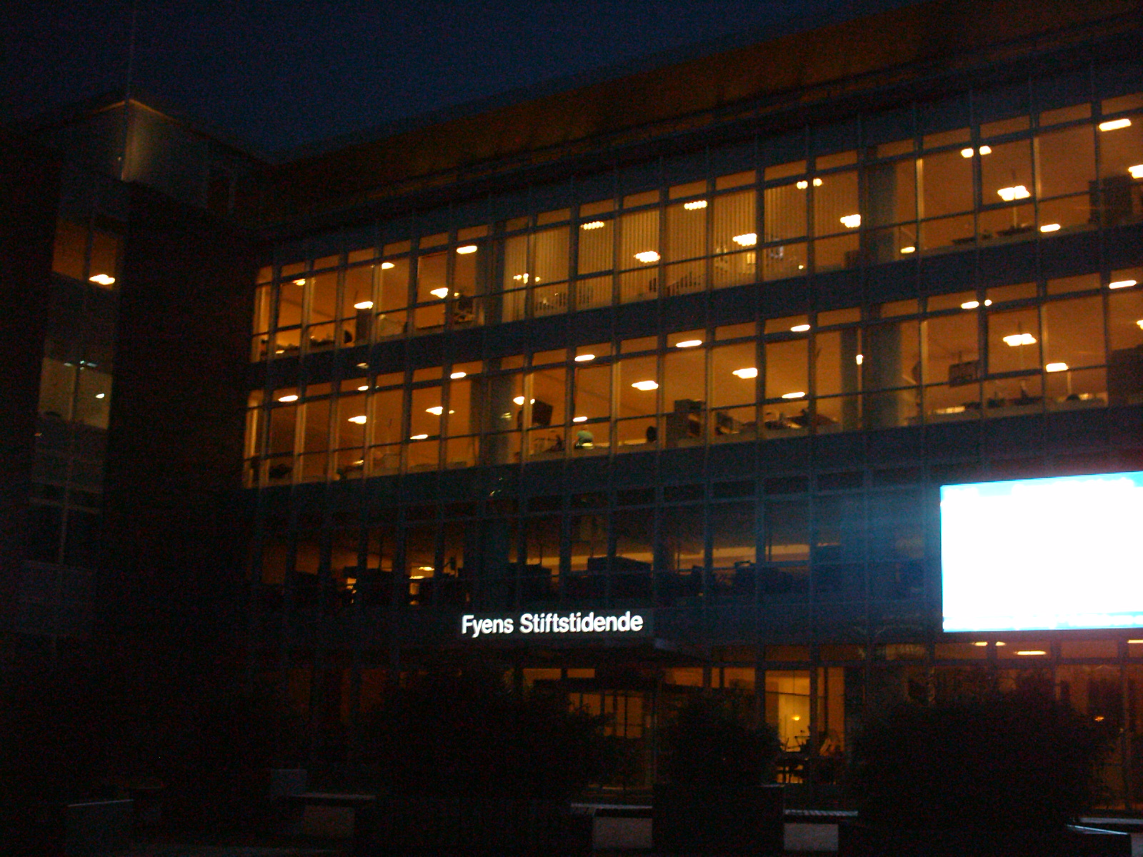 Picture of Fyens Stiftstidende's headqaurters in Odense, Denmark.